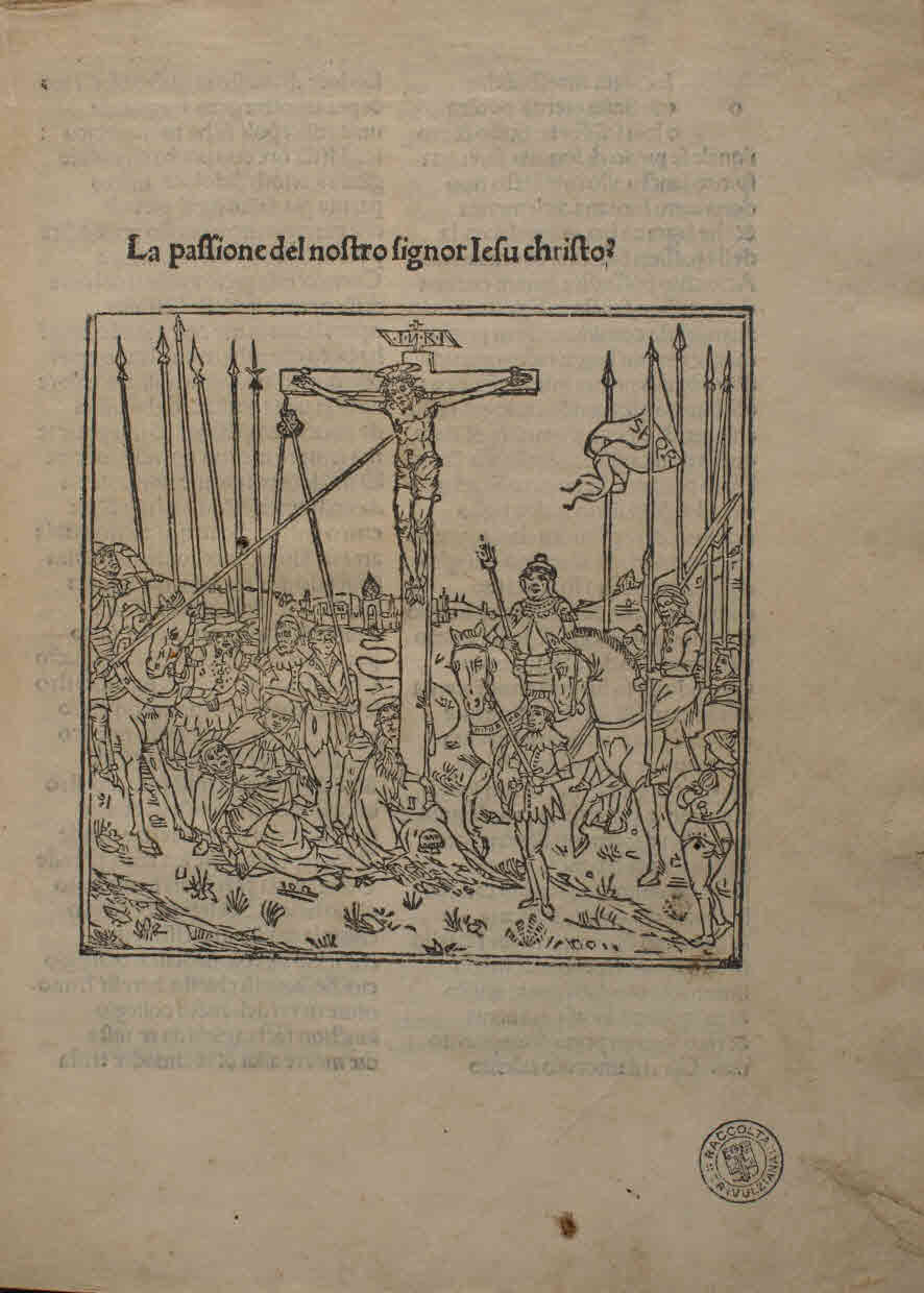 La passione di Gesù Cristo. - [Venezia] : [Bernardino Benali], [1491-1496]. - 16 c. ; a-b⁸ ; 4°.